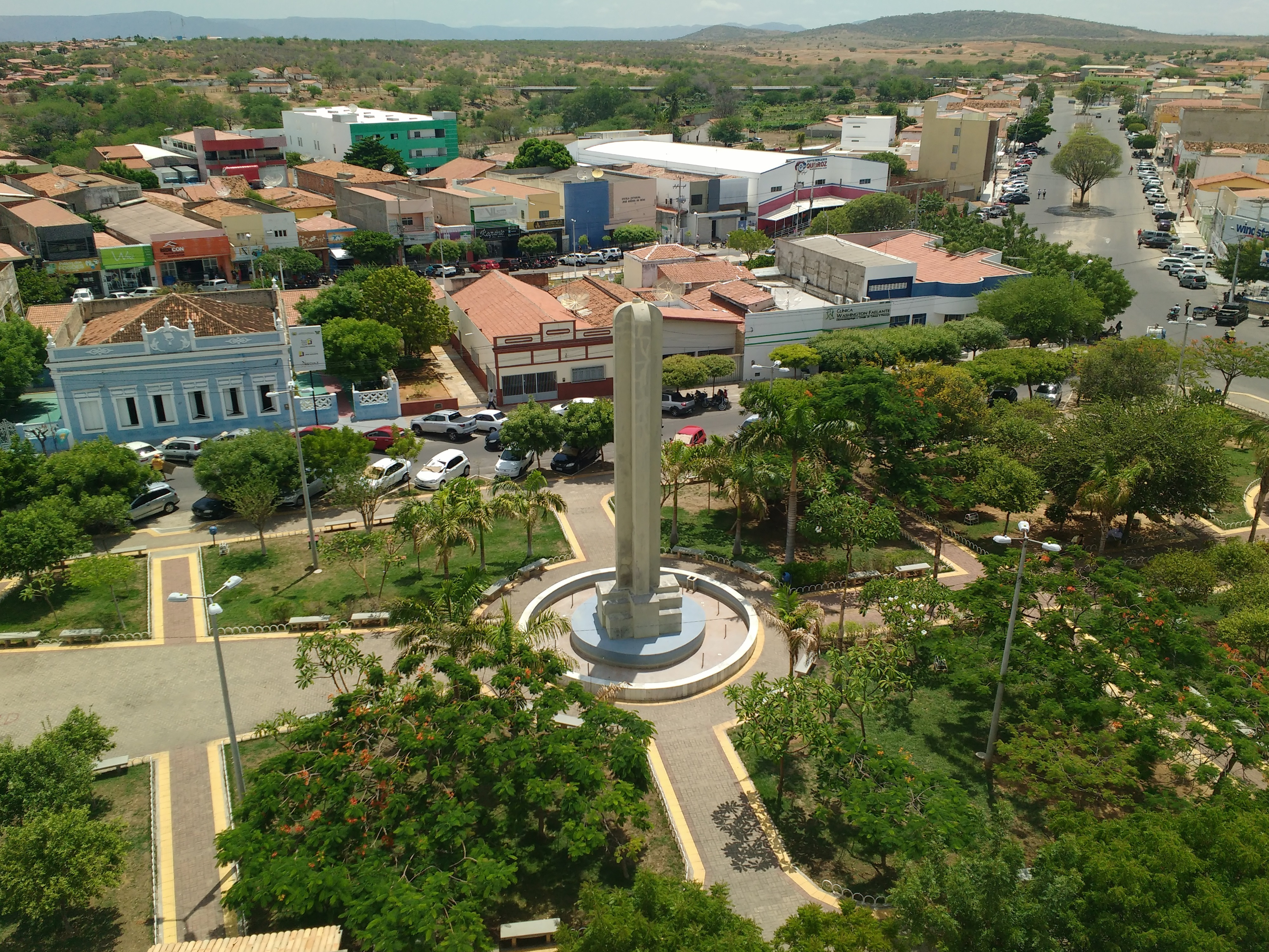 Parte do Centro de Pau dos Ferros, Rio Grande do Norte (Brasil), visto do topo do Plaza Shopping Center, com destaque para o obelisco (Praça Monsenhor Caminha) e a Avenida Getúlio Vargas.